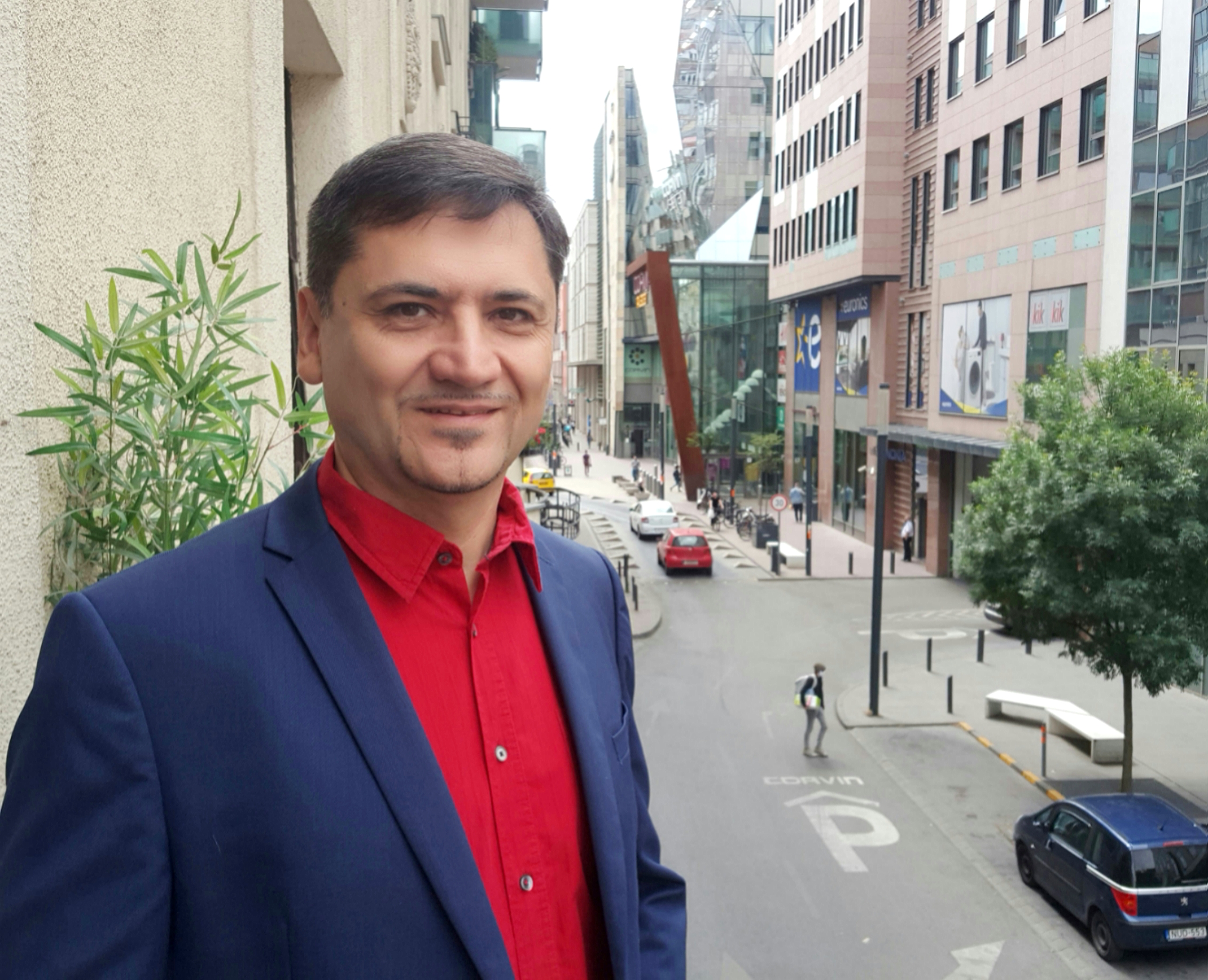 Драган Јаковљевић